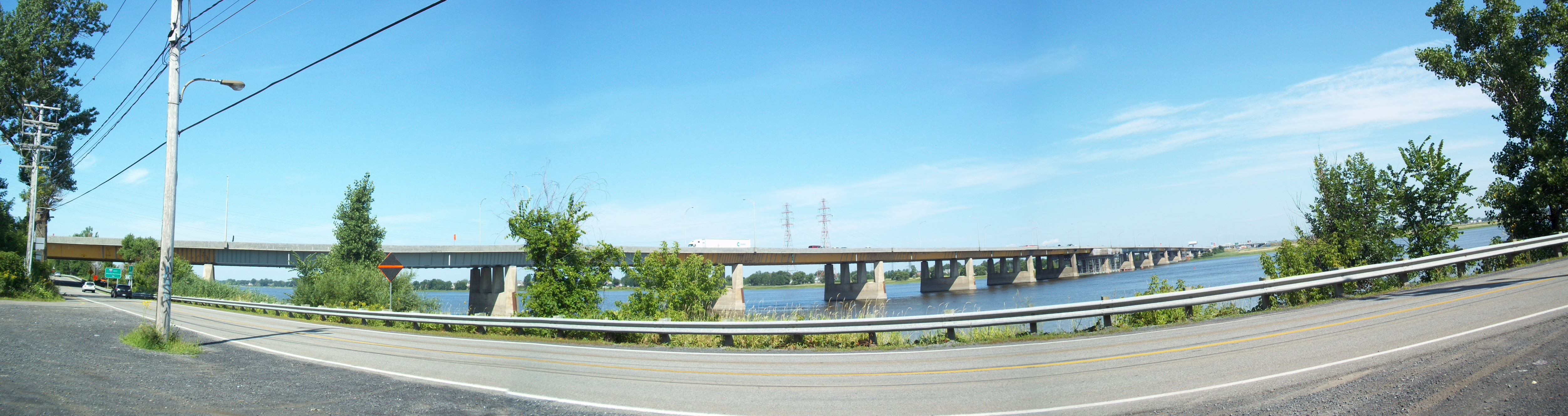 Pont Charles-De Gaulle, vu du boulevard Gouin, Montréal